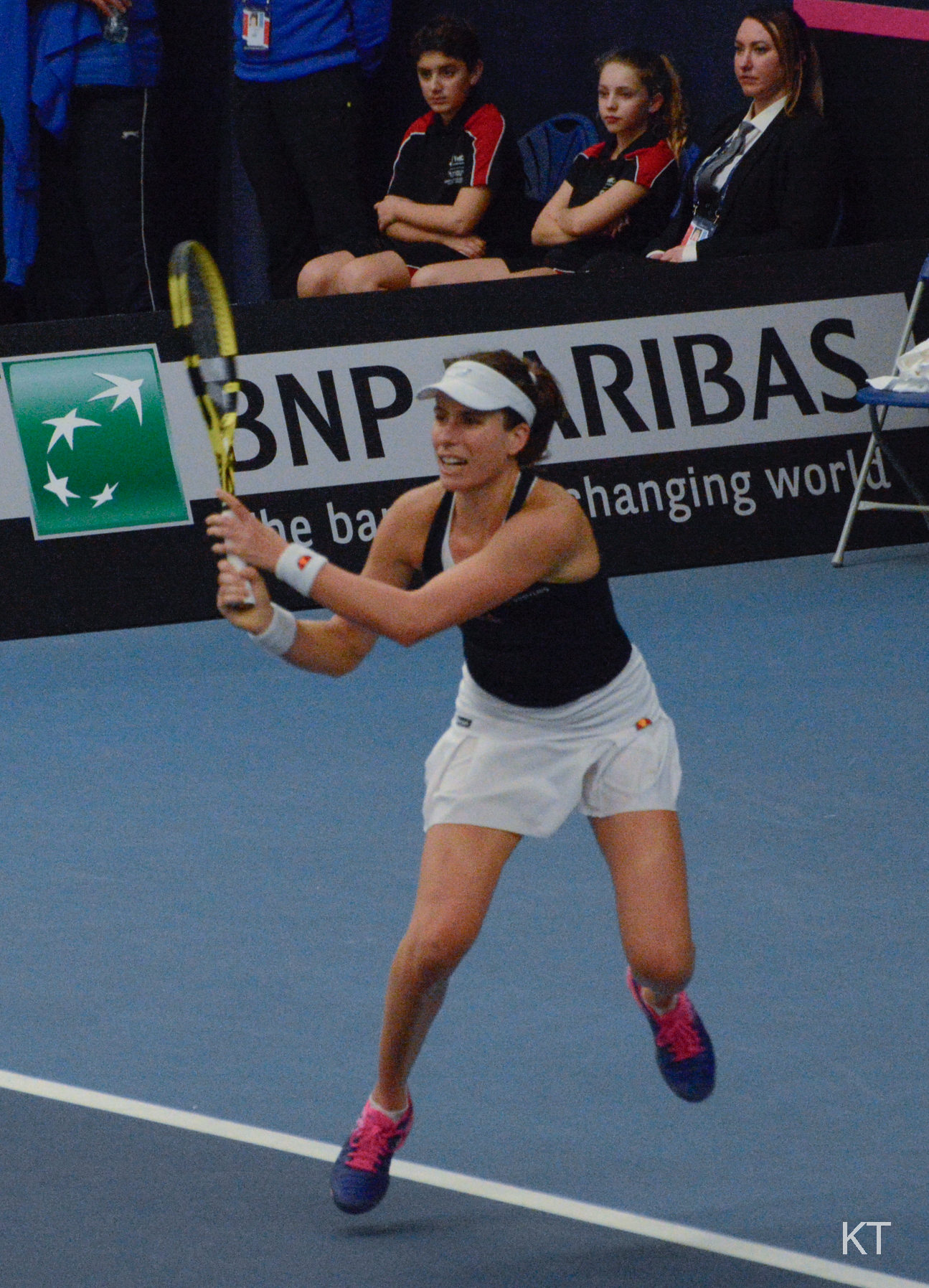 Jo Konta